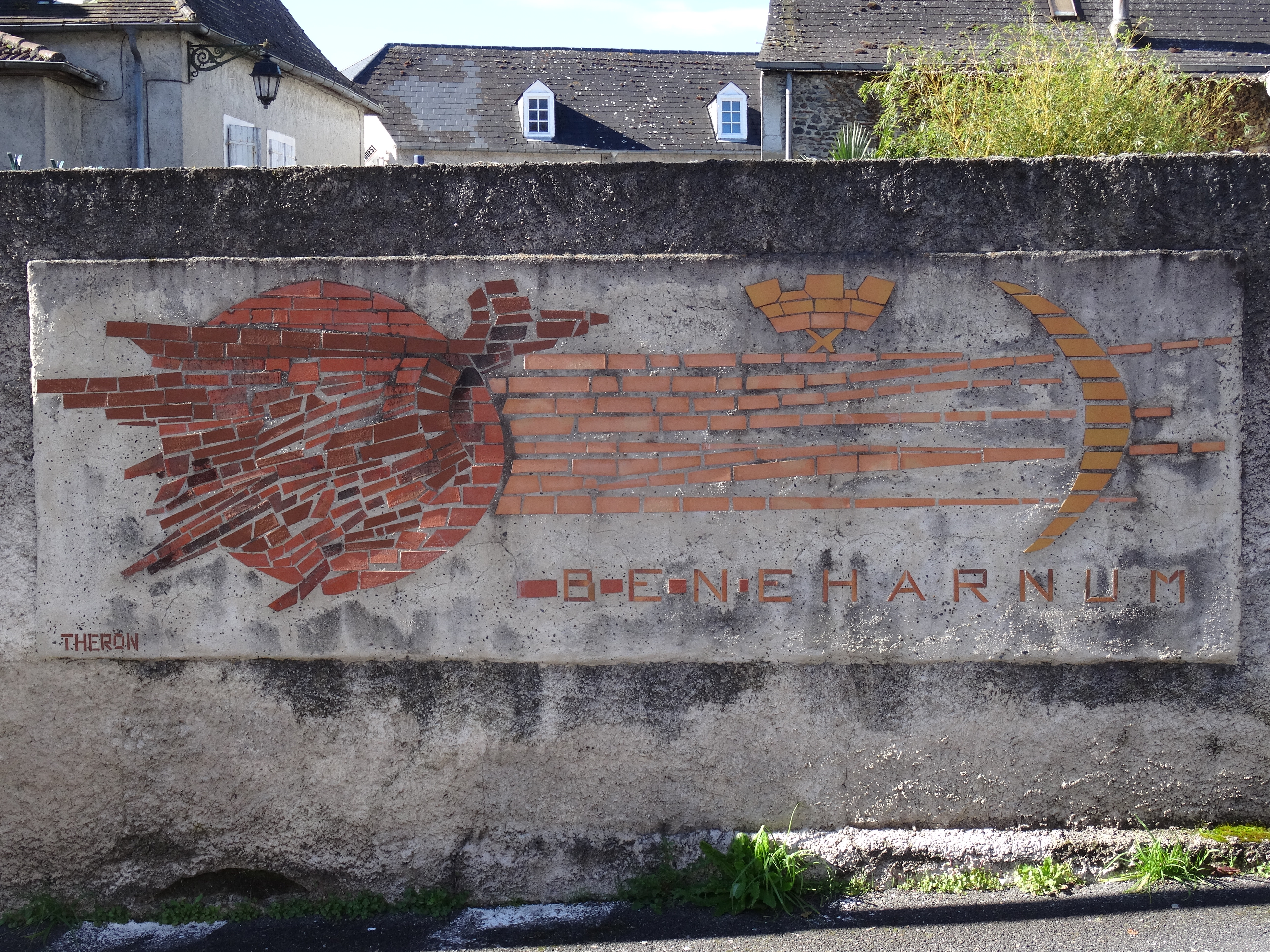 Inscription "Beneharnum" devant la poste de Lescar